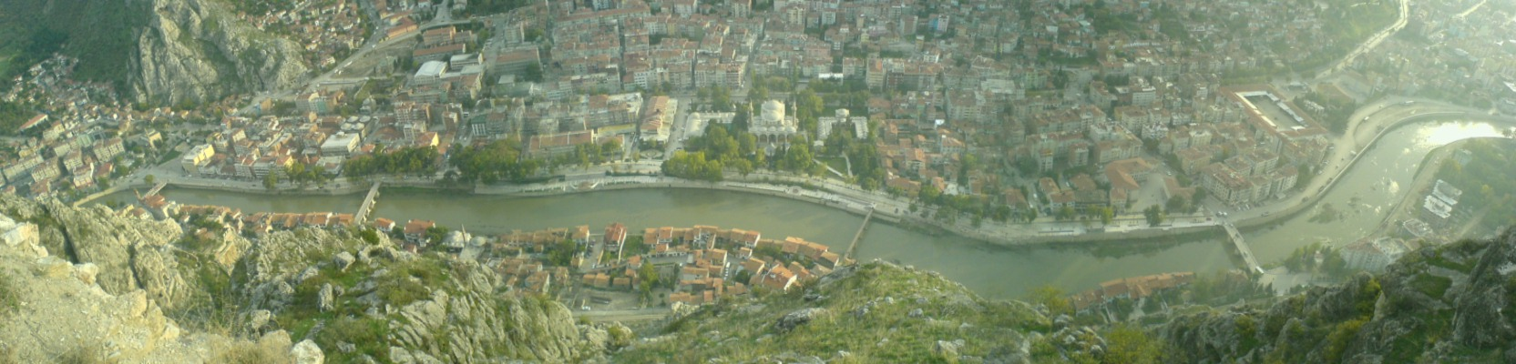 Amasya ve Yeşilırmak nehrinin kaleden görünüşü, view of Amasya/Turkiye and Yesilirmak river from the castle